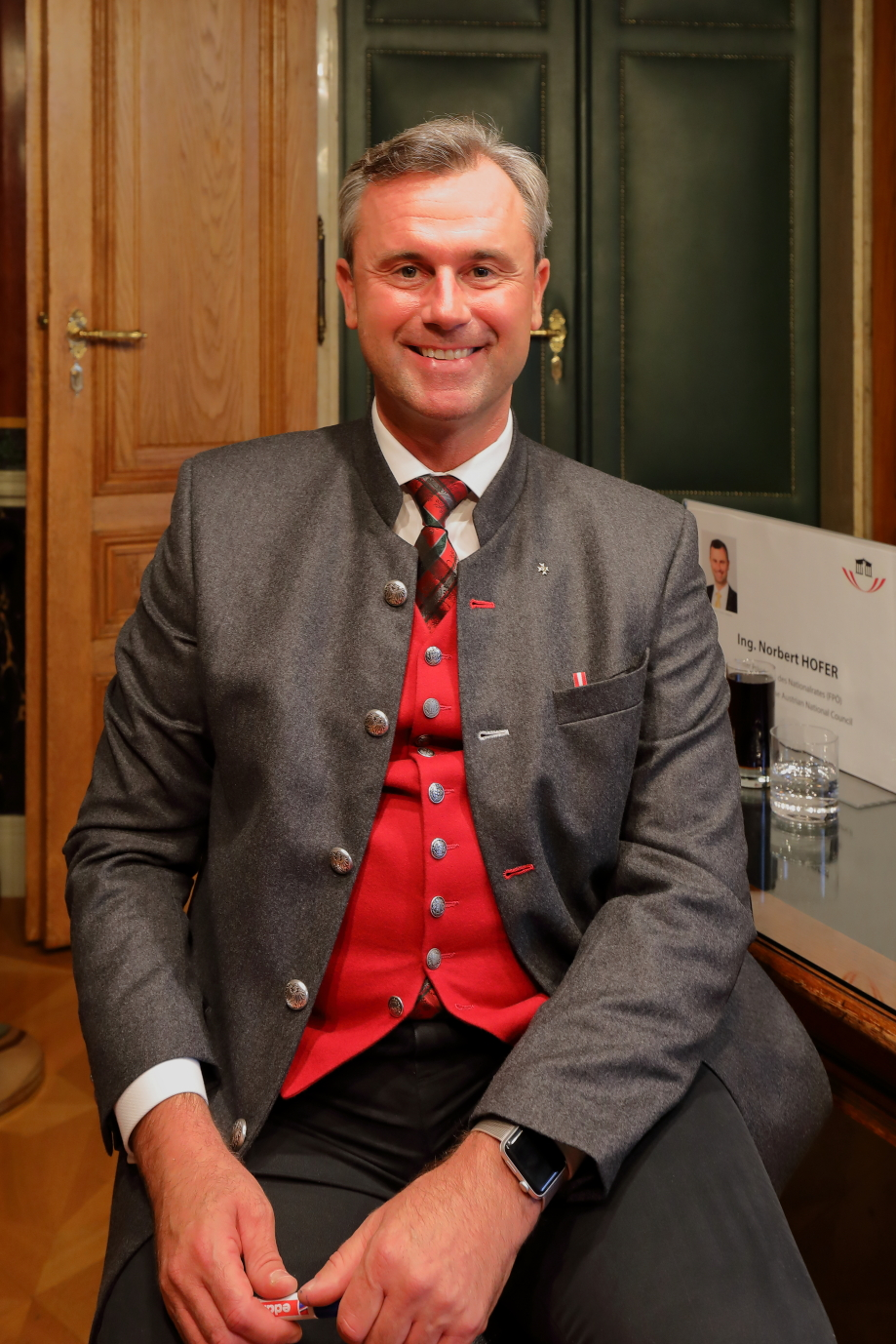 Norbert Hofer, 3. Parlamentspräsident und interimistischer Bundespräsident, im österreichischen Parlament anlässlich dem Tag der offenen Tür am Nationalfeiertag 2016.